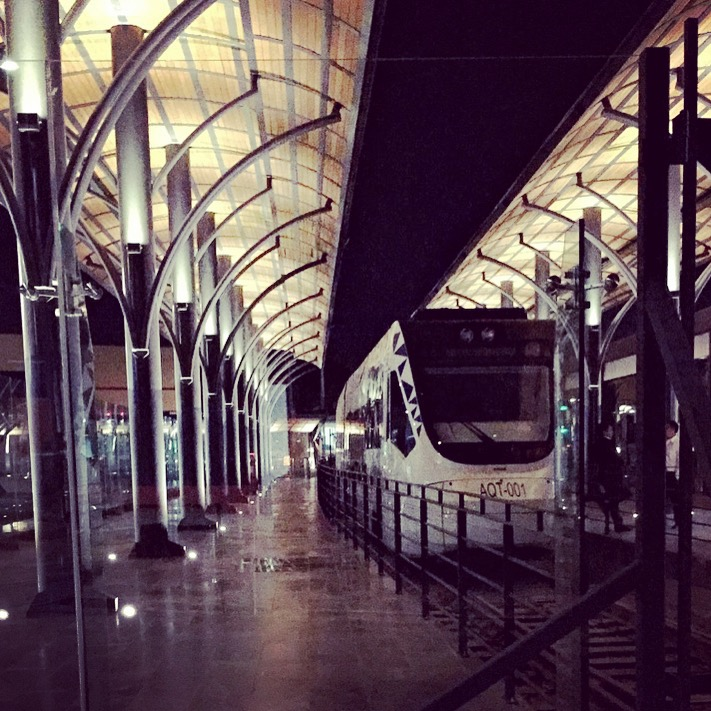 Tren Puebla Cholula